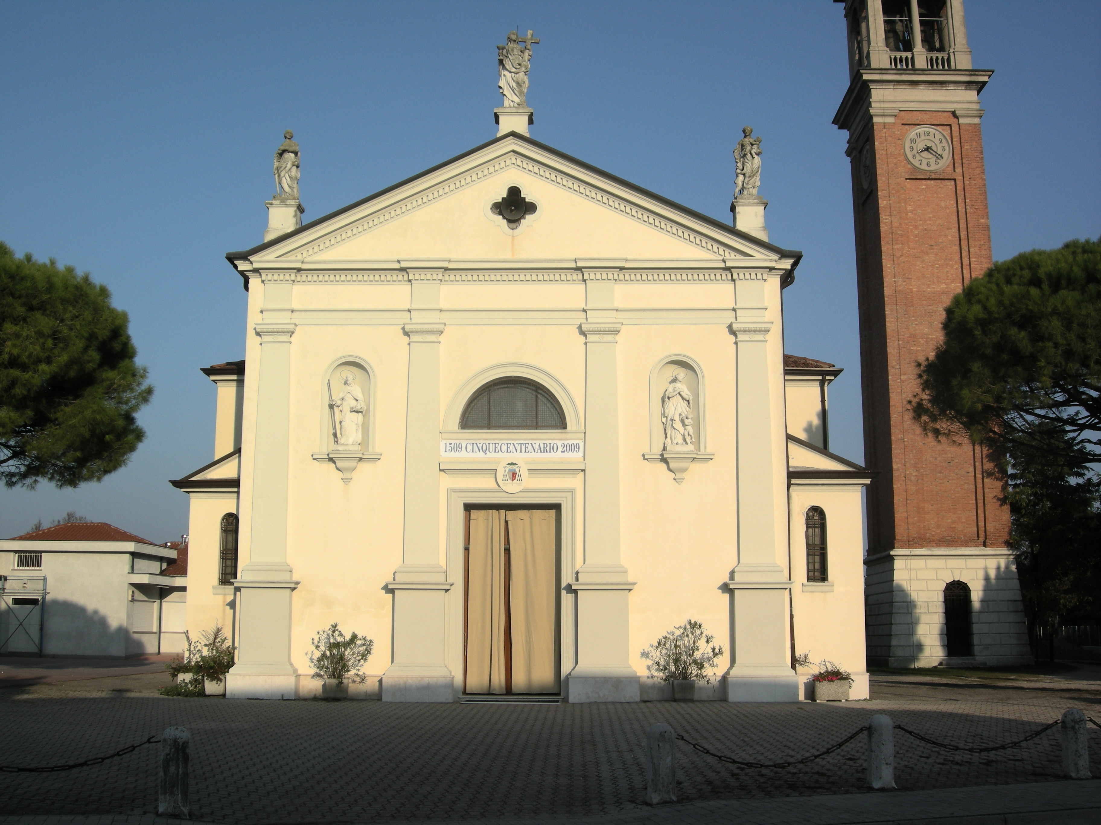 Cervellin, opera propria, Chiesa di Croce di Musile di Piave VE Italy,GFDL lic., data 31.10.2009